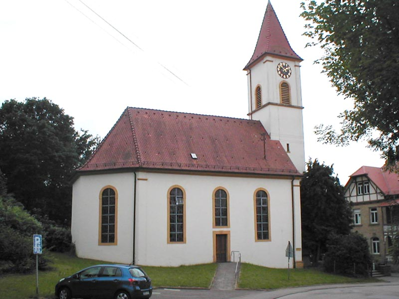 Evangelische Kirche in Daisbach. Kirchenschiff aus dem 18. Jhd., Turm von 1937